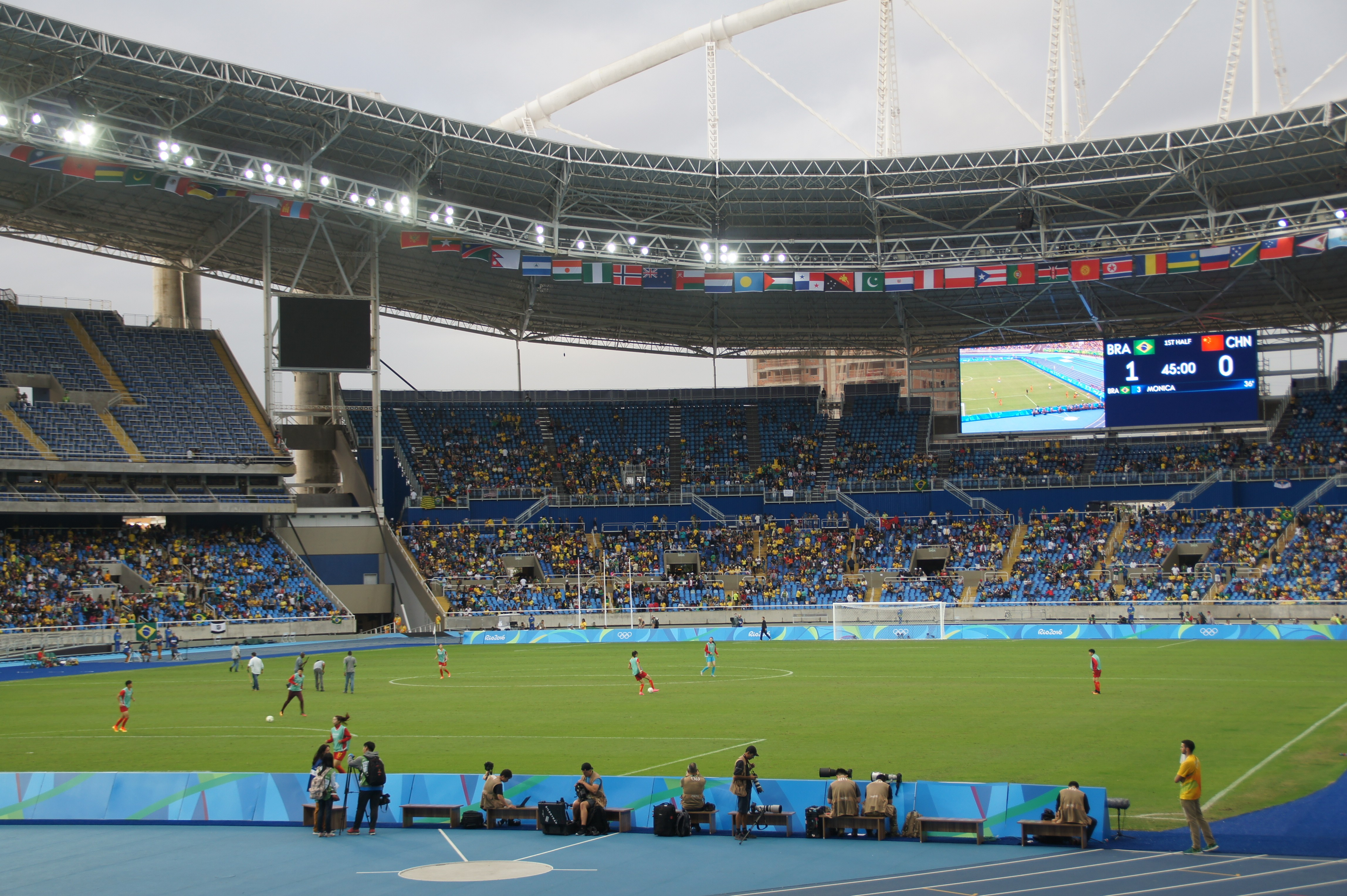 Futebol Feminino Brasil 3 x 0 China Rio 2016, Rio de Janeiro, Brasil. 03/08/16